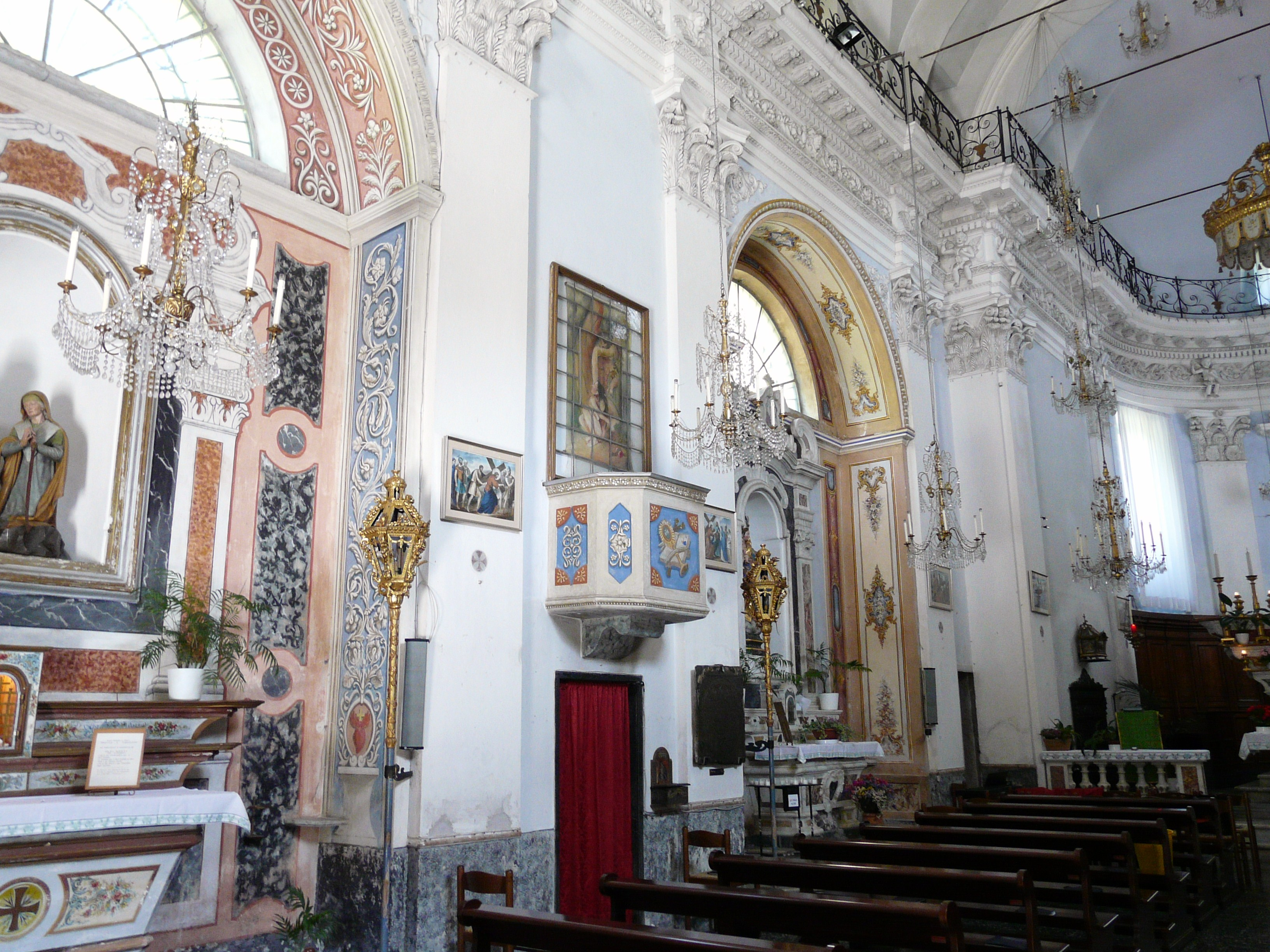 Interno della prioria di Sant'Eufemiano, Graveglia, Carasco, Liguria, Italia